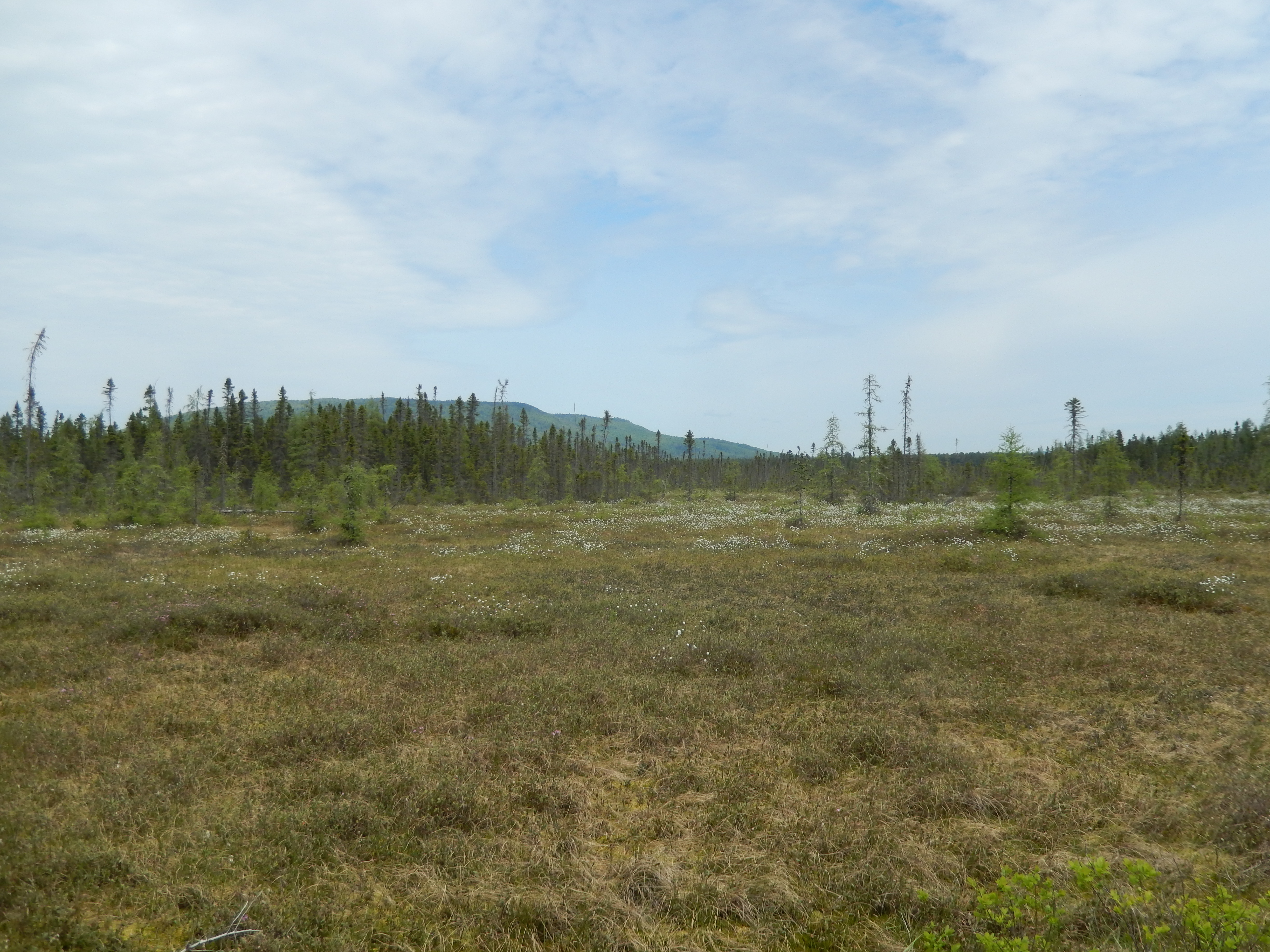 Réserve écologique de la Tourbière-de-Shannon